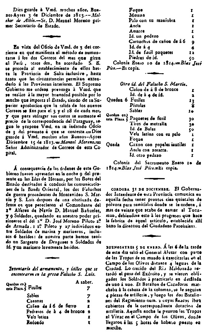 Página de la Gazeta de Buenos-Ayres. Noticias de la captura del San Luis y el San Martín por Seaver